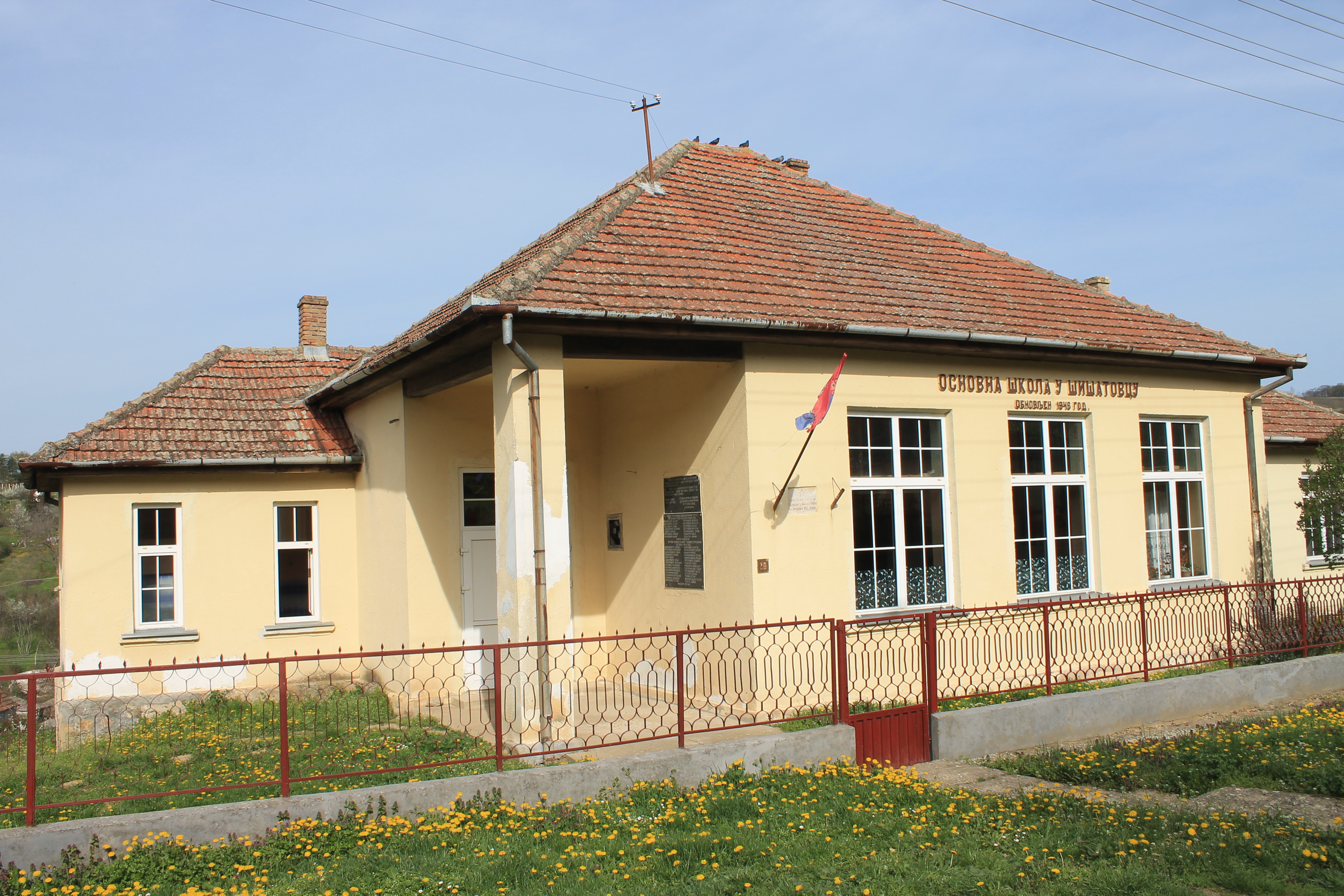 Šišatovac